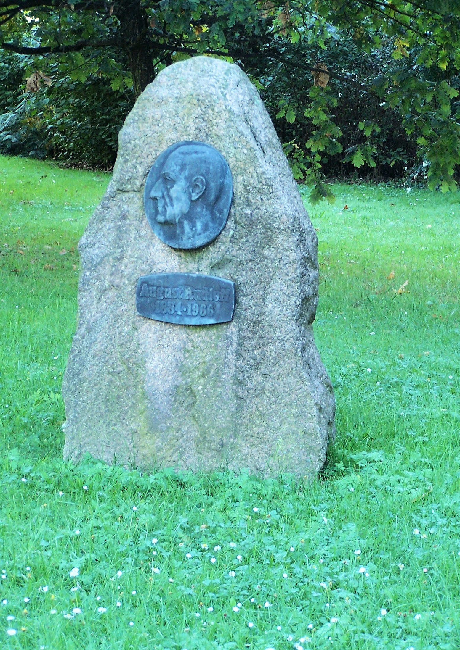 Das Denkmal von August Rudloff im Eisenacher Wohngebiet Petersberg (in der August-Rudloff-Straße).